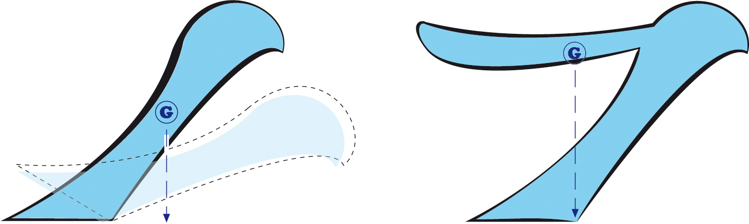 Grabitate zentrotik pasatzen den bertikala formaren barruan erortzen bada ez da forma hori eroriko.